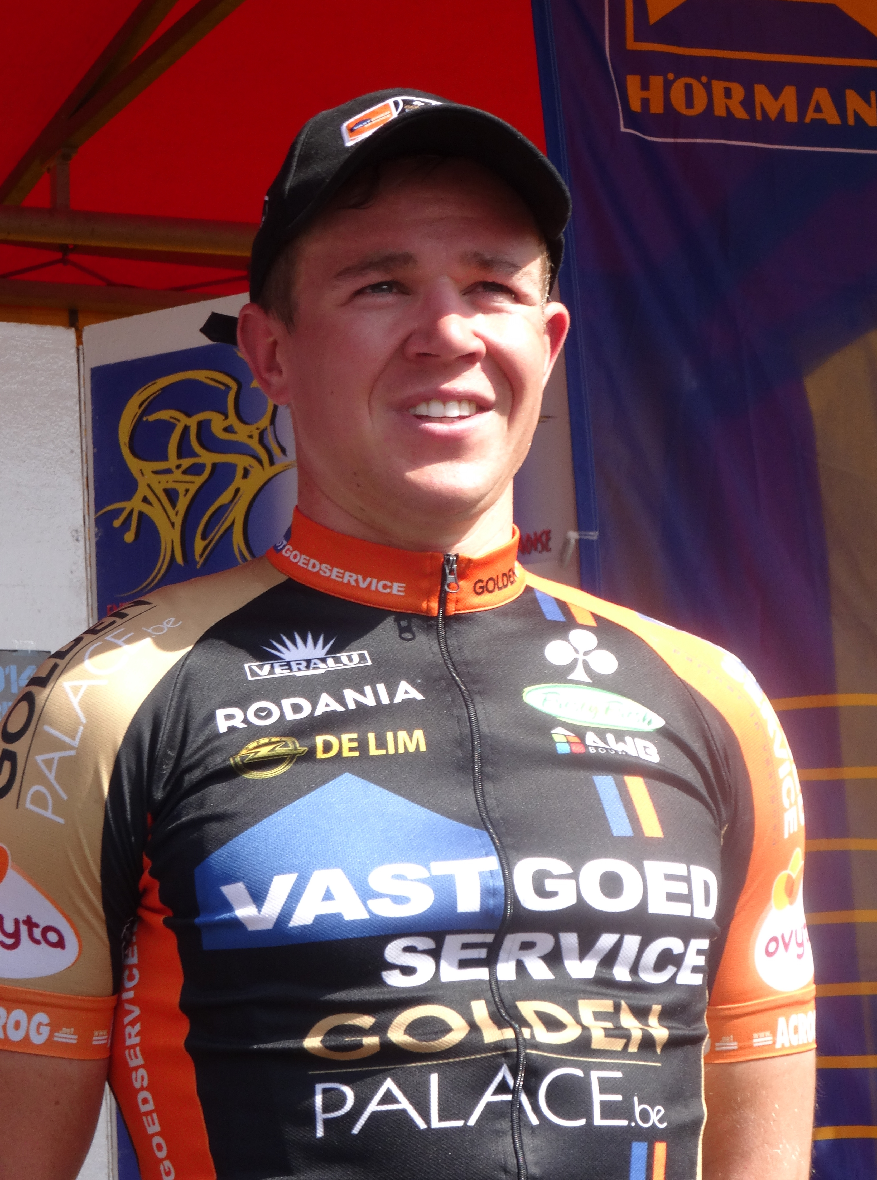 Grand Prix Criquielion 2014, Deux-Acren.